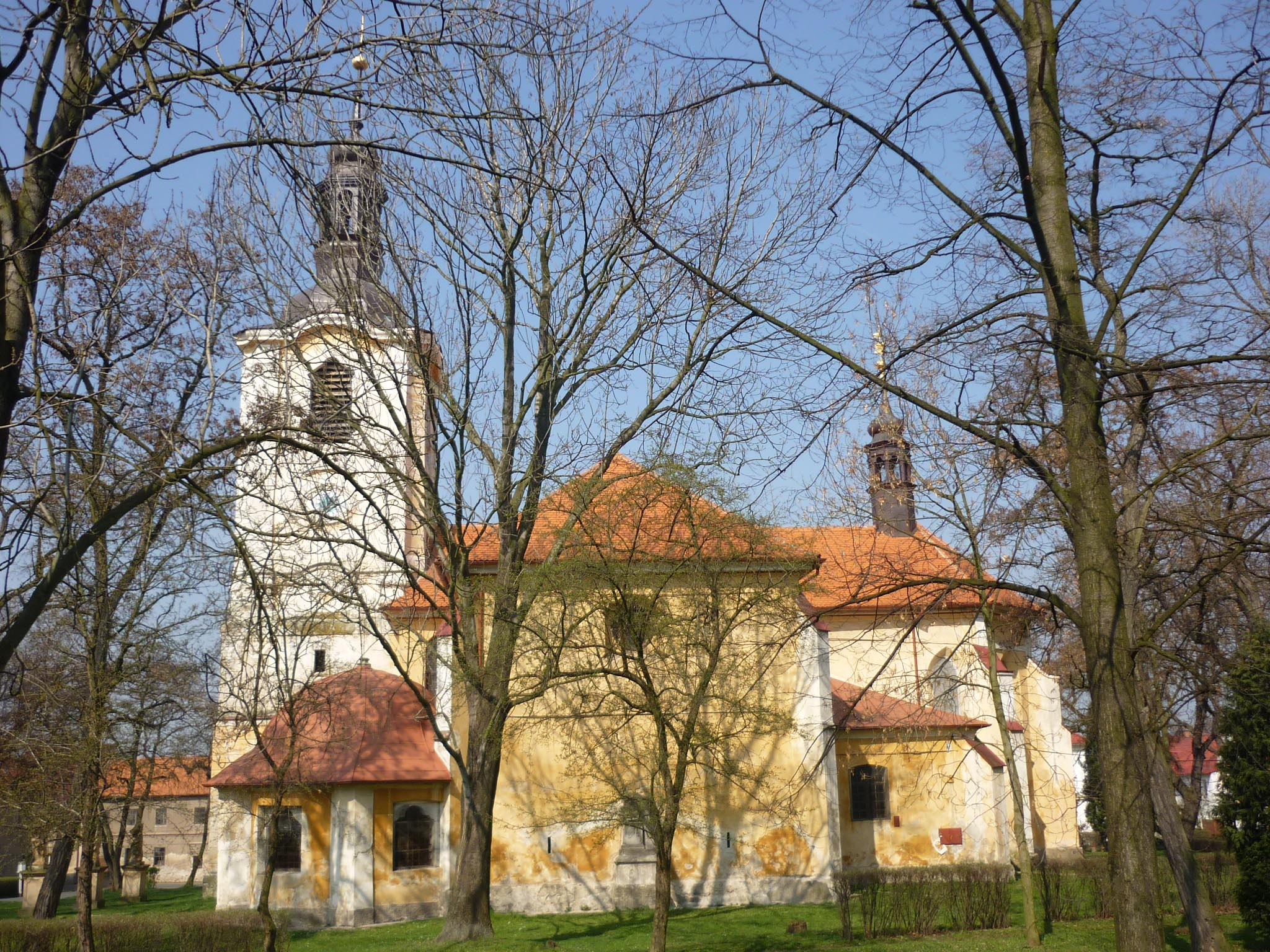 Wallfahrtskirche in Liebeschitz bei Saaz (Libĕšice, Okres Louny)